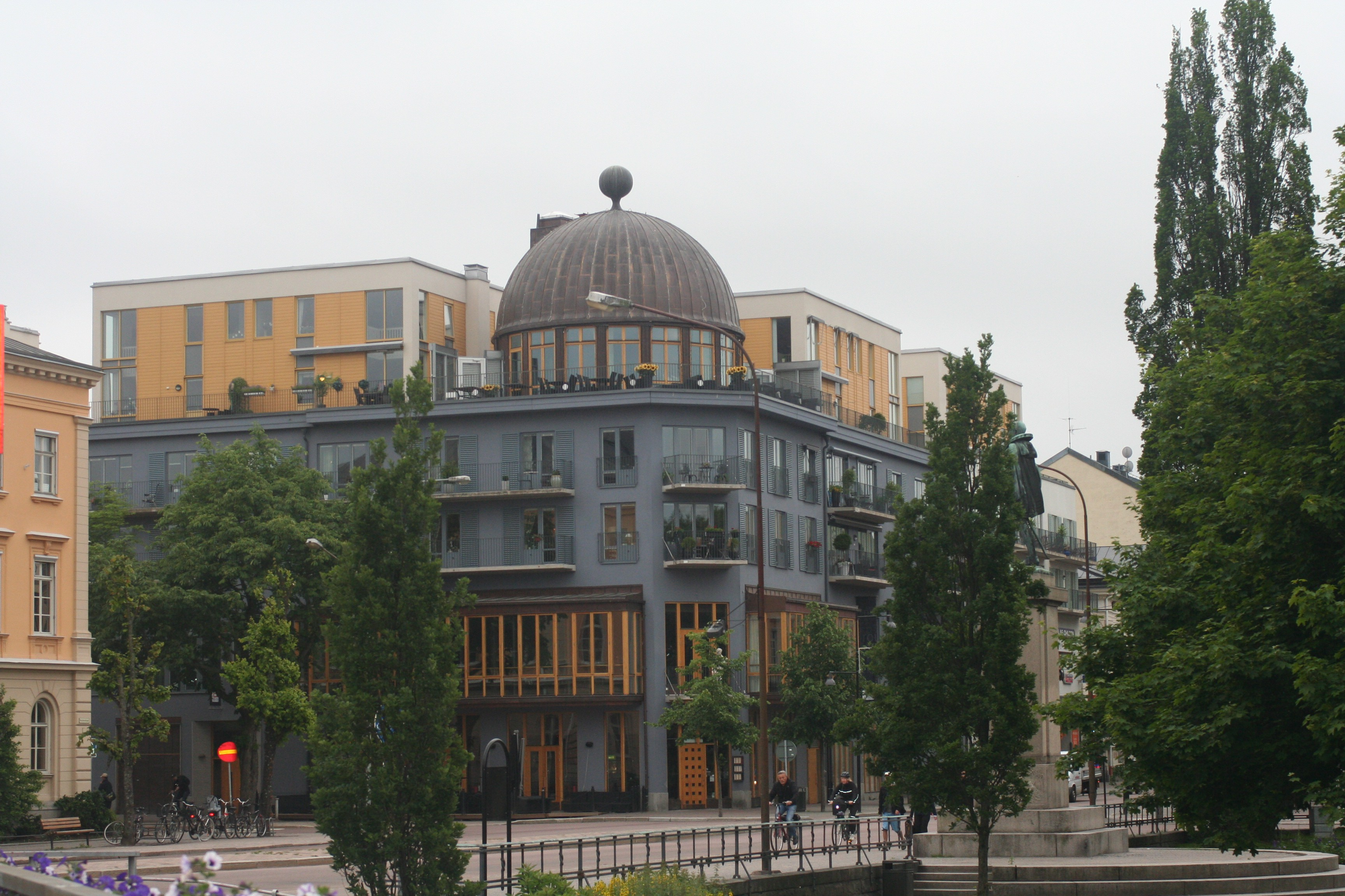 Mitt i city Karlstad i juni 2011, vy från Klara